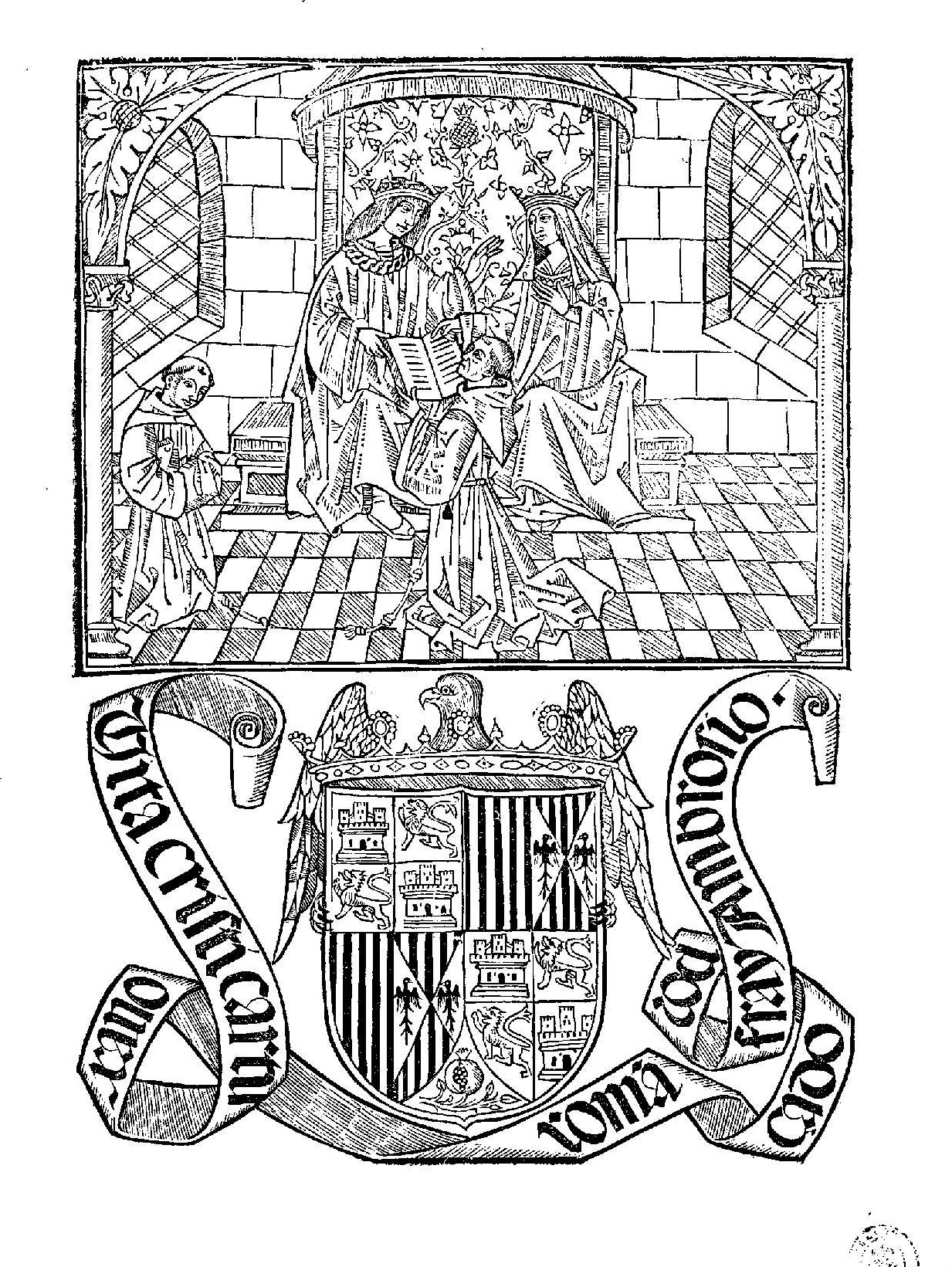 Portada xilográfica de la Vita Christi de Ludolfo de Sajonia traducida por fray Ambrosio Montesinos, impresa en "Alcala de henares por īdustria [et] arte del muy ingenioso [et] hōrrado Stanislao de polonia ... [et] impremiose a costa [et] espensas del virtuoso ... Garcia de rueda ...(1502/1503). En la parte superior los Reyes Católicos recibiendo un ejemplar del libro de manos de un fraile; debajo, escudo real con una cinta en la que figura el título: "Vita Cristi cartu/xano // romā/çado/ por fray /Ambrosio"